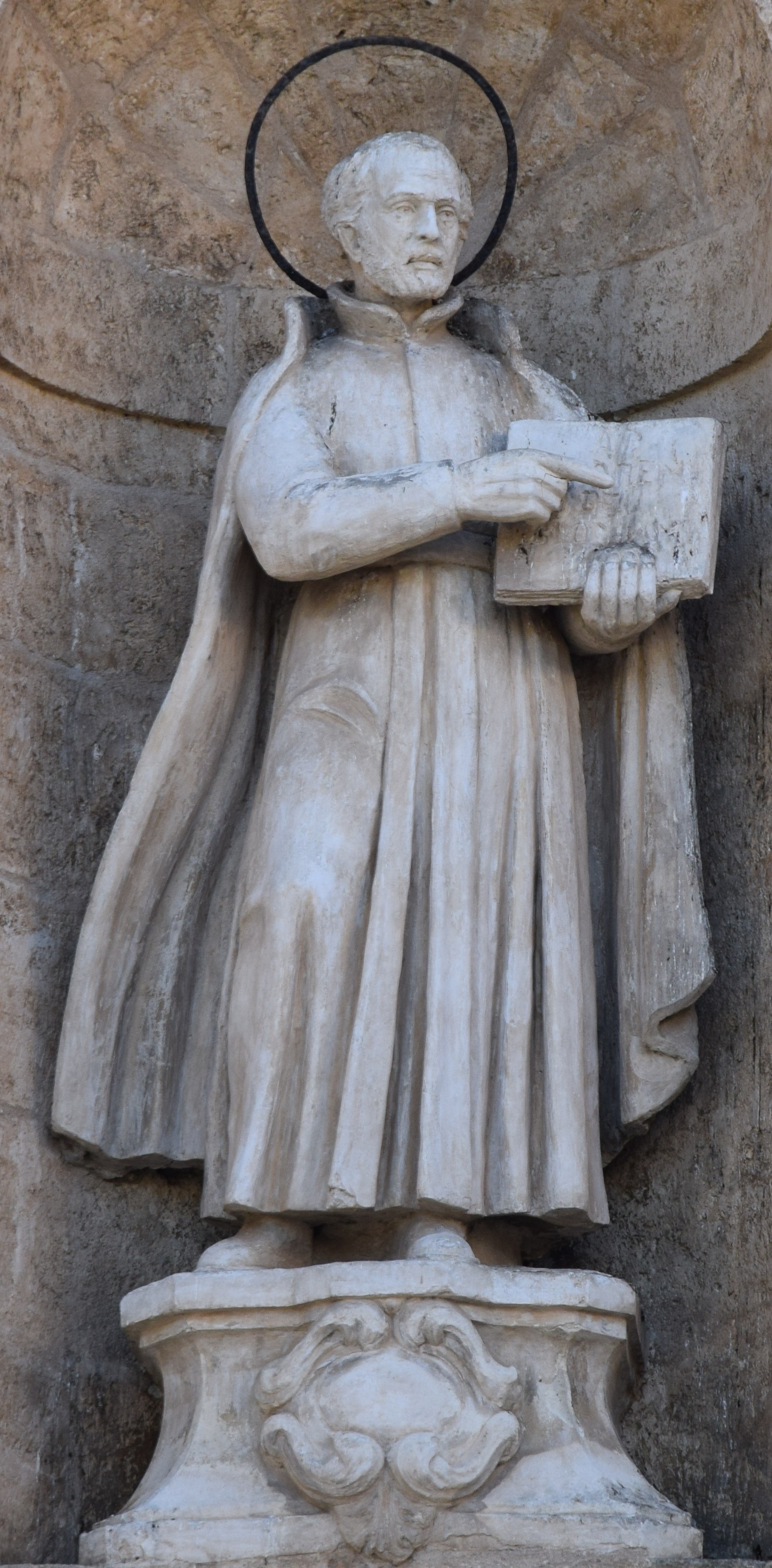 sant'Ignazio di Loyola, rifatta da Giuseppe Bambina